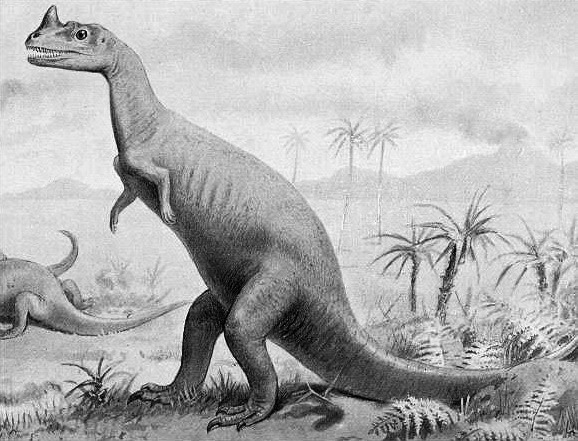 Ceratosaurus - old illustration